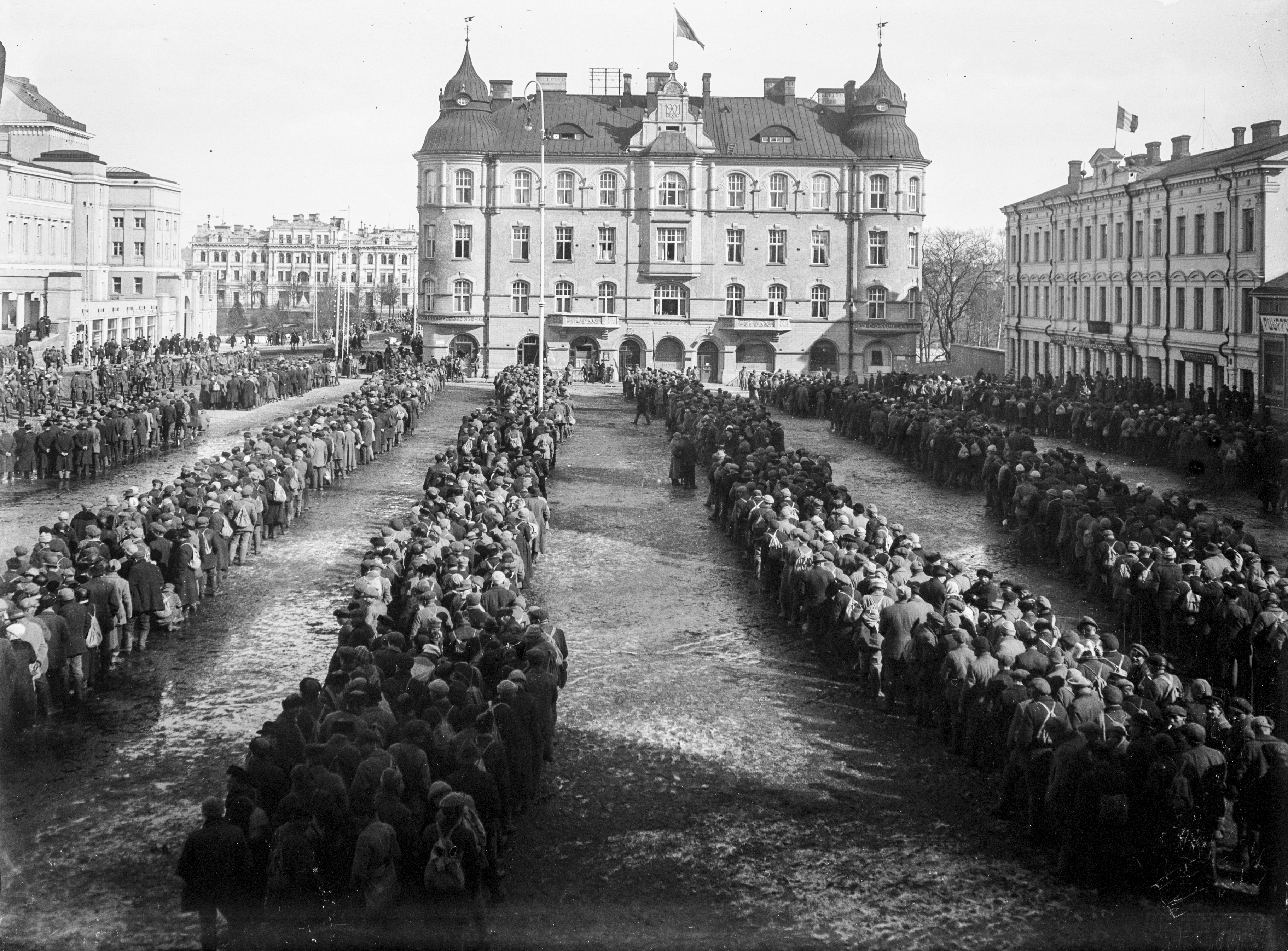 Oikealla olevan Selinin talon katolla liehuu Italian lippu ja taustalla Sumeliuksen talossa Ruotsin lippu. CC-BY Tampere 1918, kuvaaja E. A. Bergius, Vapriikin kuva-arkisto. Finnish Civil War 1918, Photographer E. A. Bergius, Vapriikki Photo Archives.